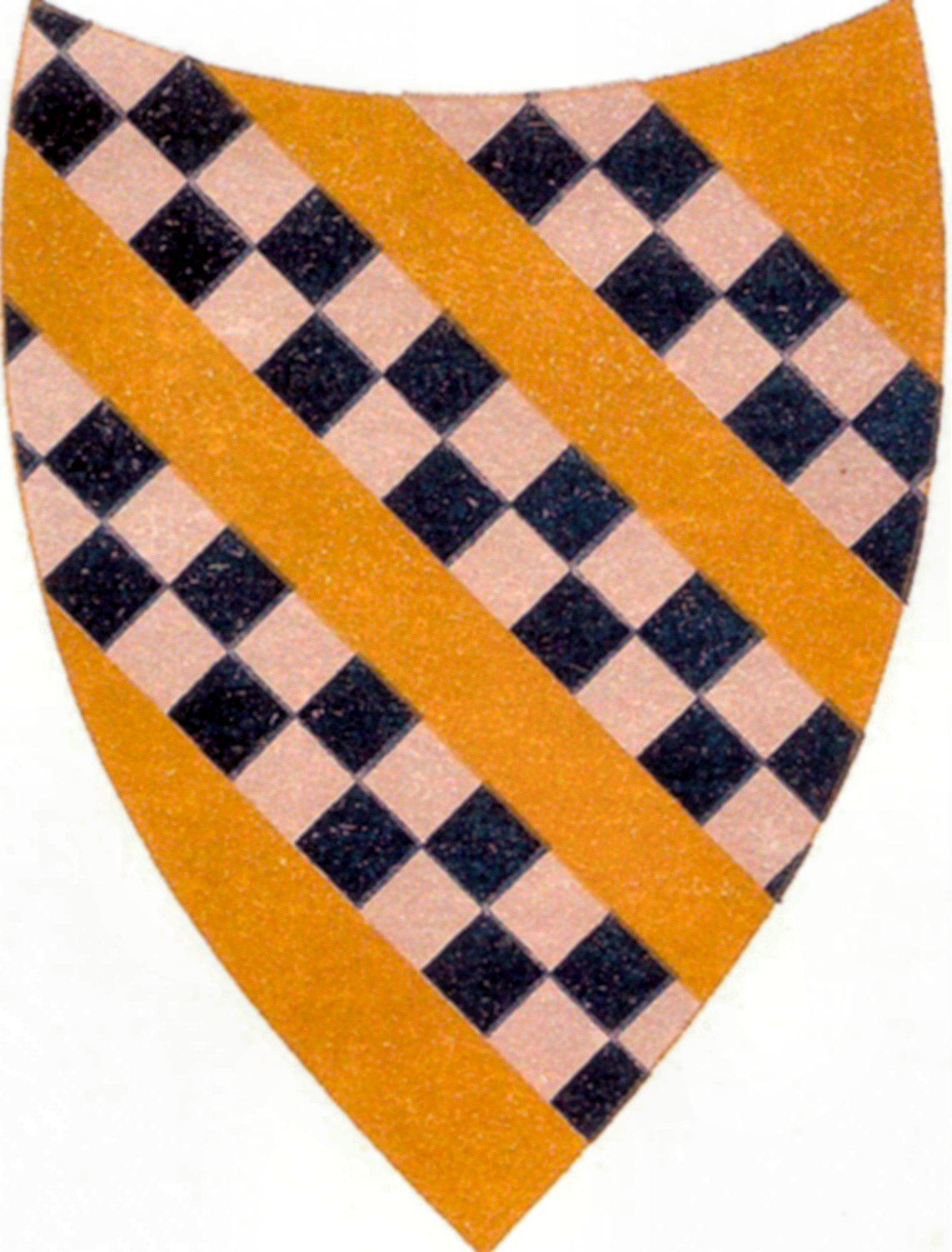 Marenzi Stammwappen 10. Jahrhundert